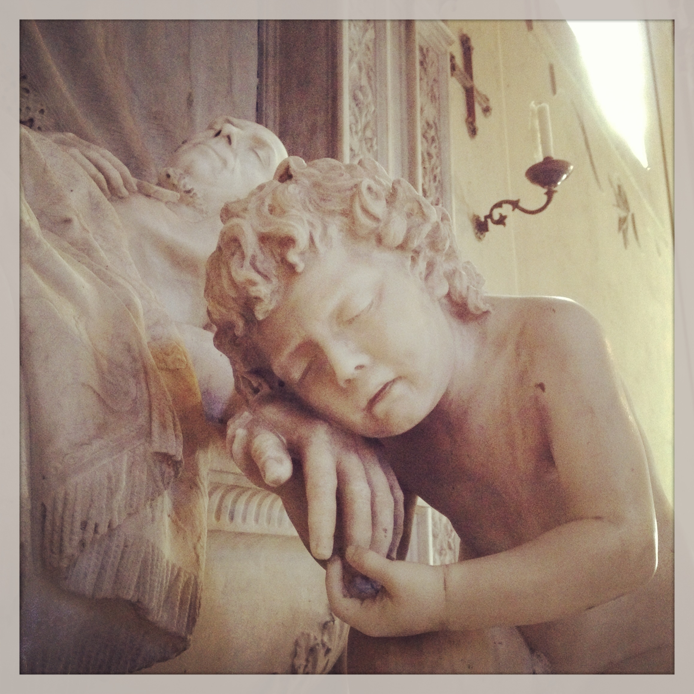 Basilica di San Clemente a Roma - tomba Basterot